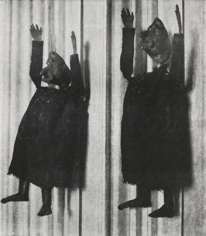 Alfred Jarry, Deux aspects de la marionnette originale d'Ubu Roi. Premiered at the Théâtre de l'Œuvre, 10 December 1896